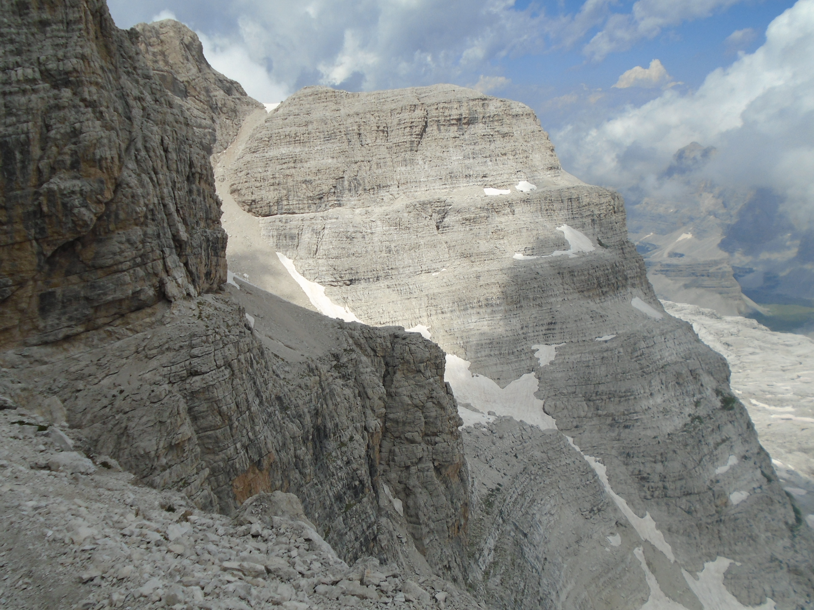 Via delle Bocchette, Brenta Dolomites